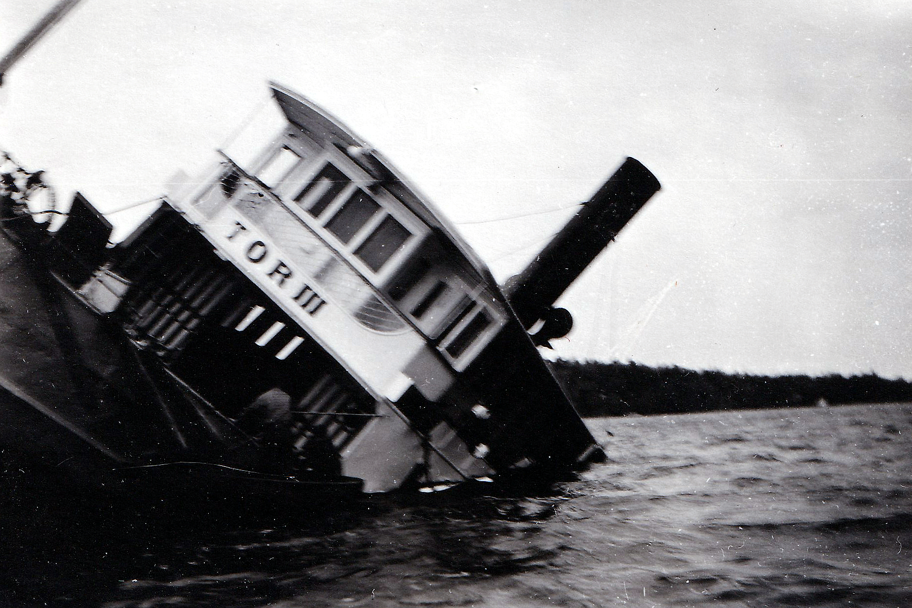 Levererad av William Lindbergs Verkstads- och Varfs AB som Wermdö III till Wermdö Ångfartygs AB, Stockholm. Trafik på traden Stockholm - Kummelnäs - Tynningö - Värmdö. Övergår 1919 till Rederi AB Stockholm - Wermdö, Stockholm när de båda rederierna slås ihop. Omdöpt till Tor III 1919.